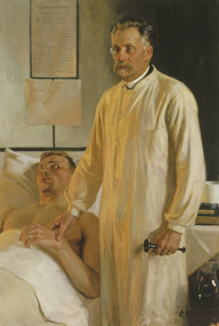 Professor Johan Wilhelm Runeberg. Porträtt av Albert Edelfelt.